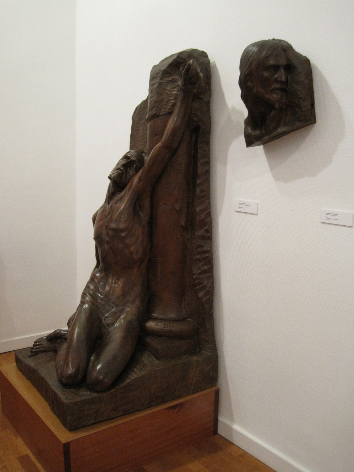 Musée art Montbéliard - Christ en chêne par le sculpteur Armand Bloch